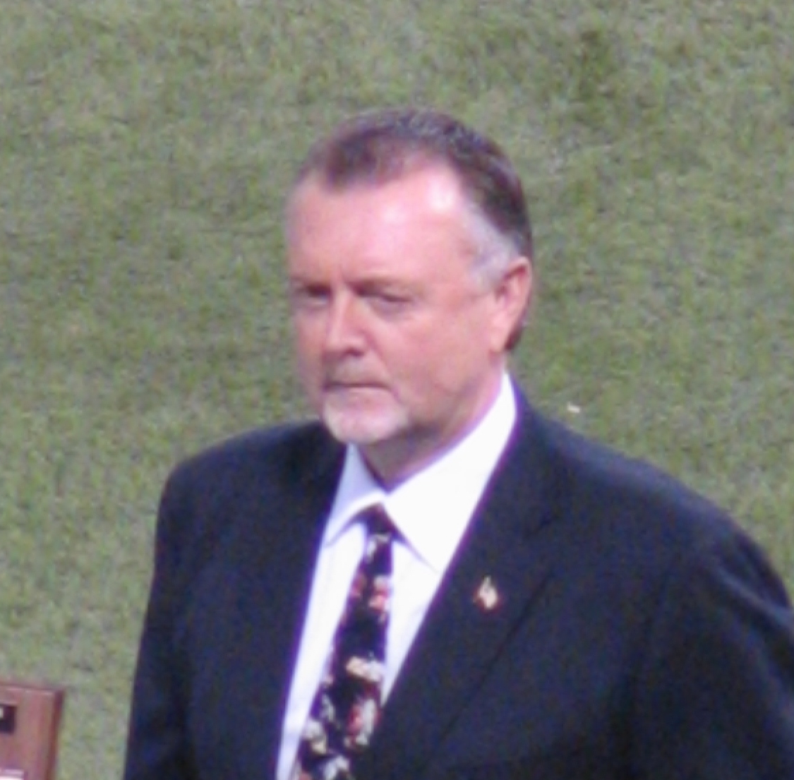 Bert Blyleven in 2008